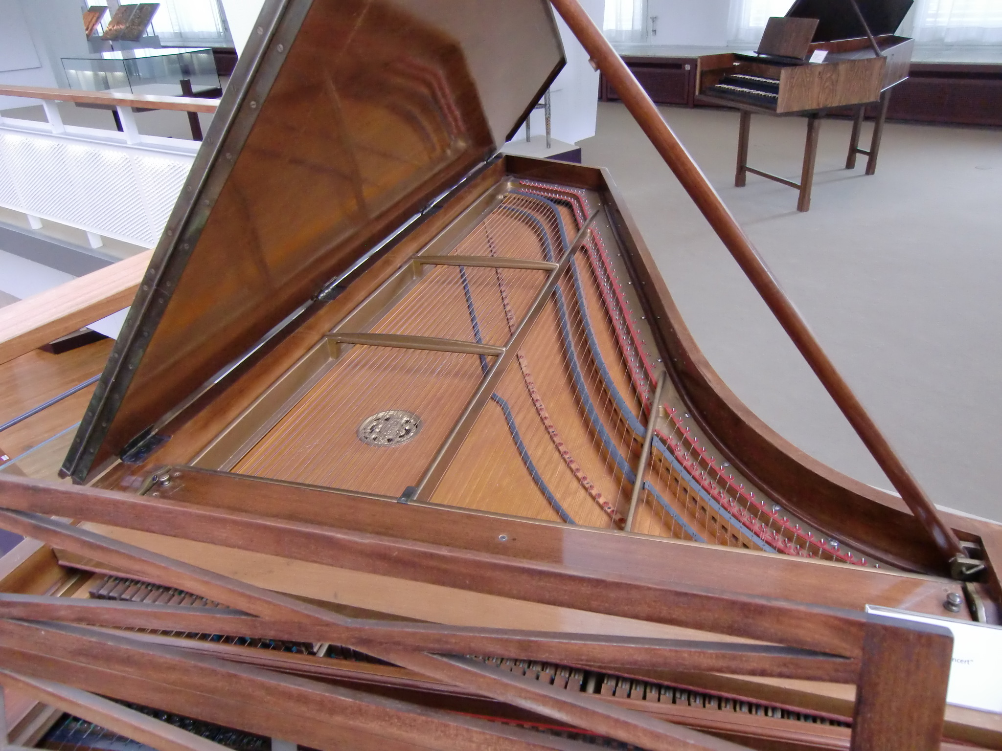 Clavecin Pleyel "Grand Modèle de Concert" (Paris, 1927) - Berlin, Musikinstrumentenmuseum - Détail table d'harmonie (cadre métallique)